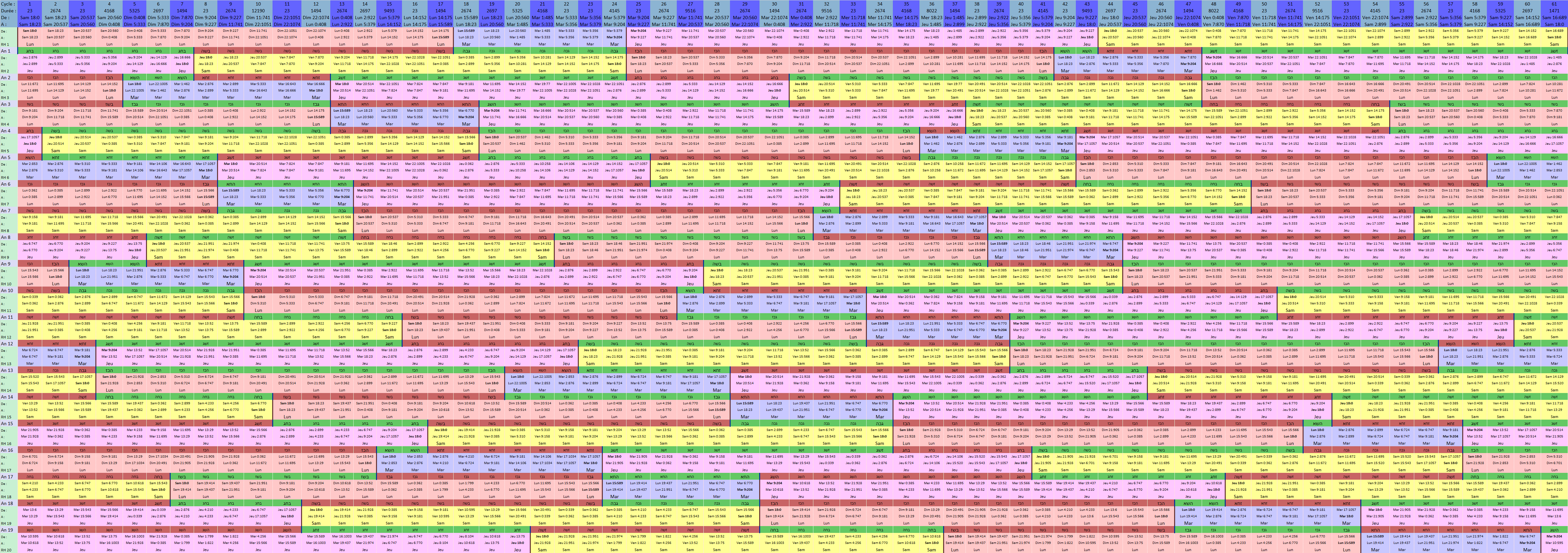 Chaque colonne représente un cycle de 19 ans possibles, caractérisé par un intervalle de temps dans la semaine où a lieu le molad du début de la première année.